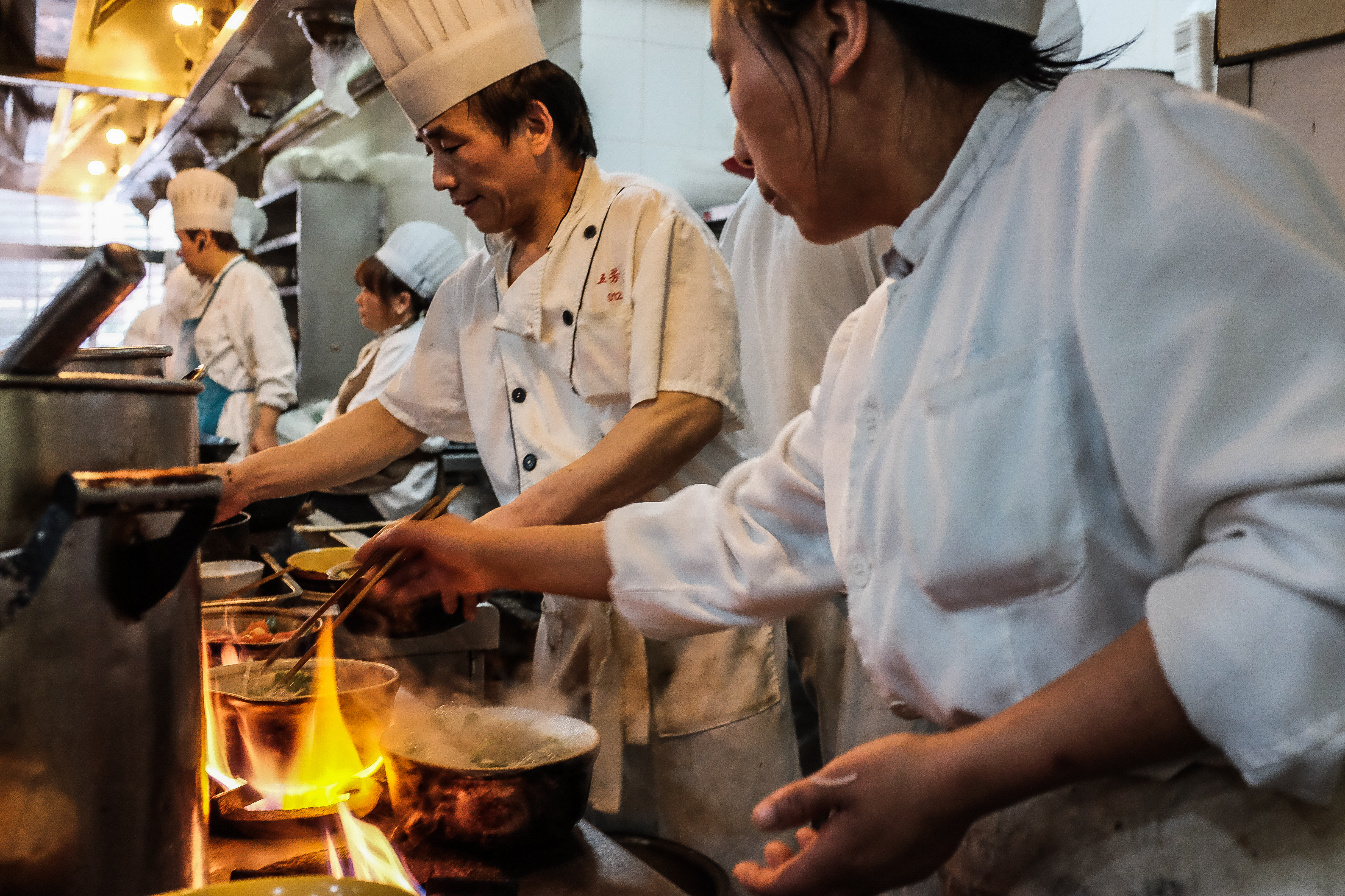 Kochbrigade bei der Zubereitung und beim Garen von verschiedenen Speisen und mit verschiedenen Garmethoden, hier in der Küche eines chinesischen Restaurants